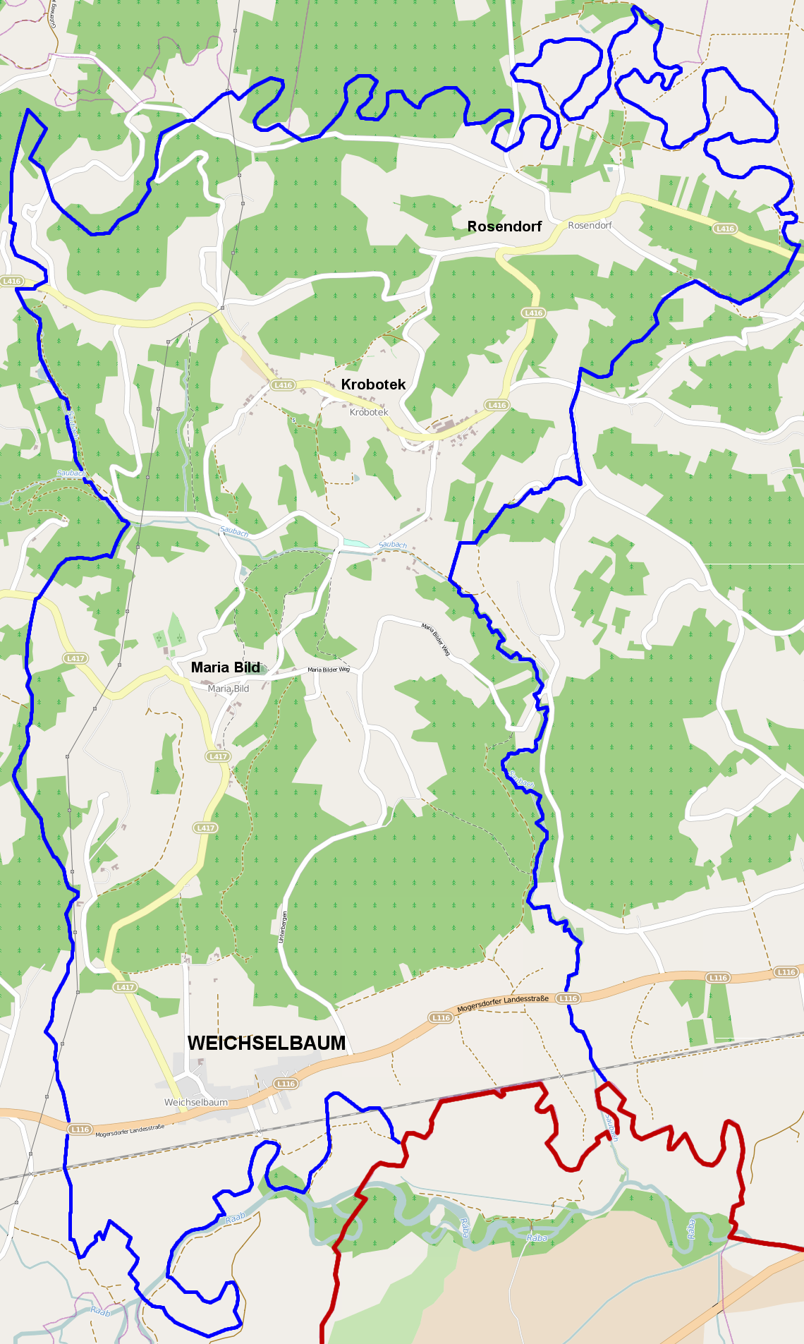 Landkarte von Weichselbaum (Burgenland)